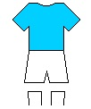 Tottenham-mez